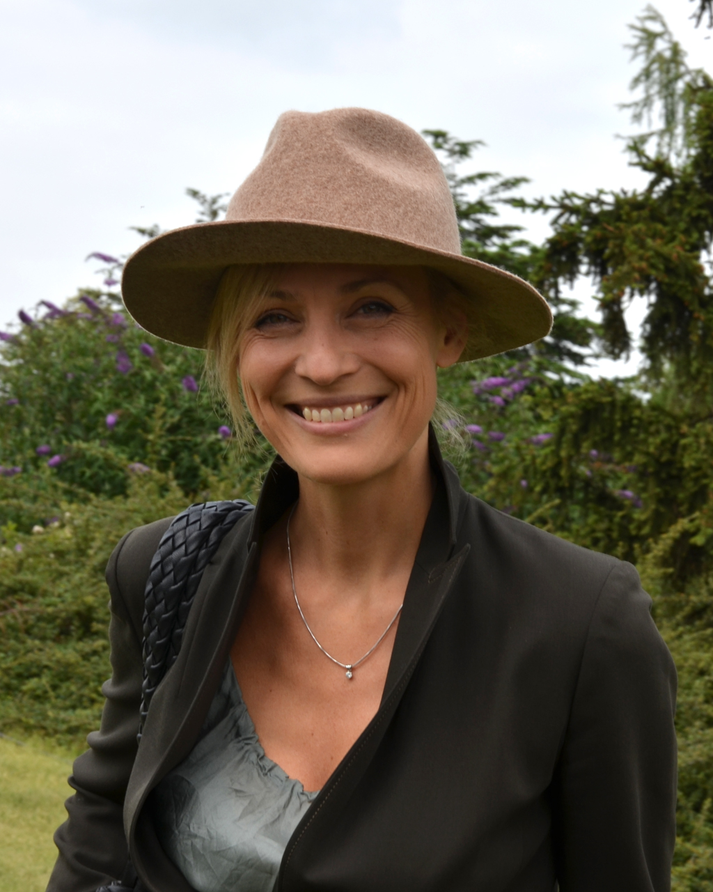 Martina Šmuková (2018)